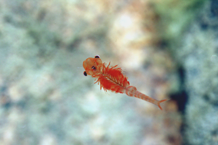 Chirocephalus marchesonii - Lago di Pilato - Marche - Italia